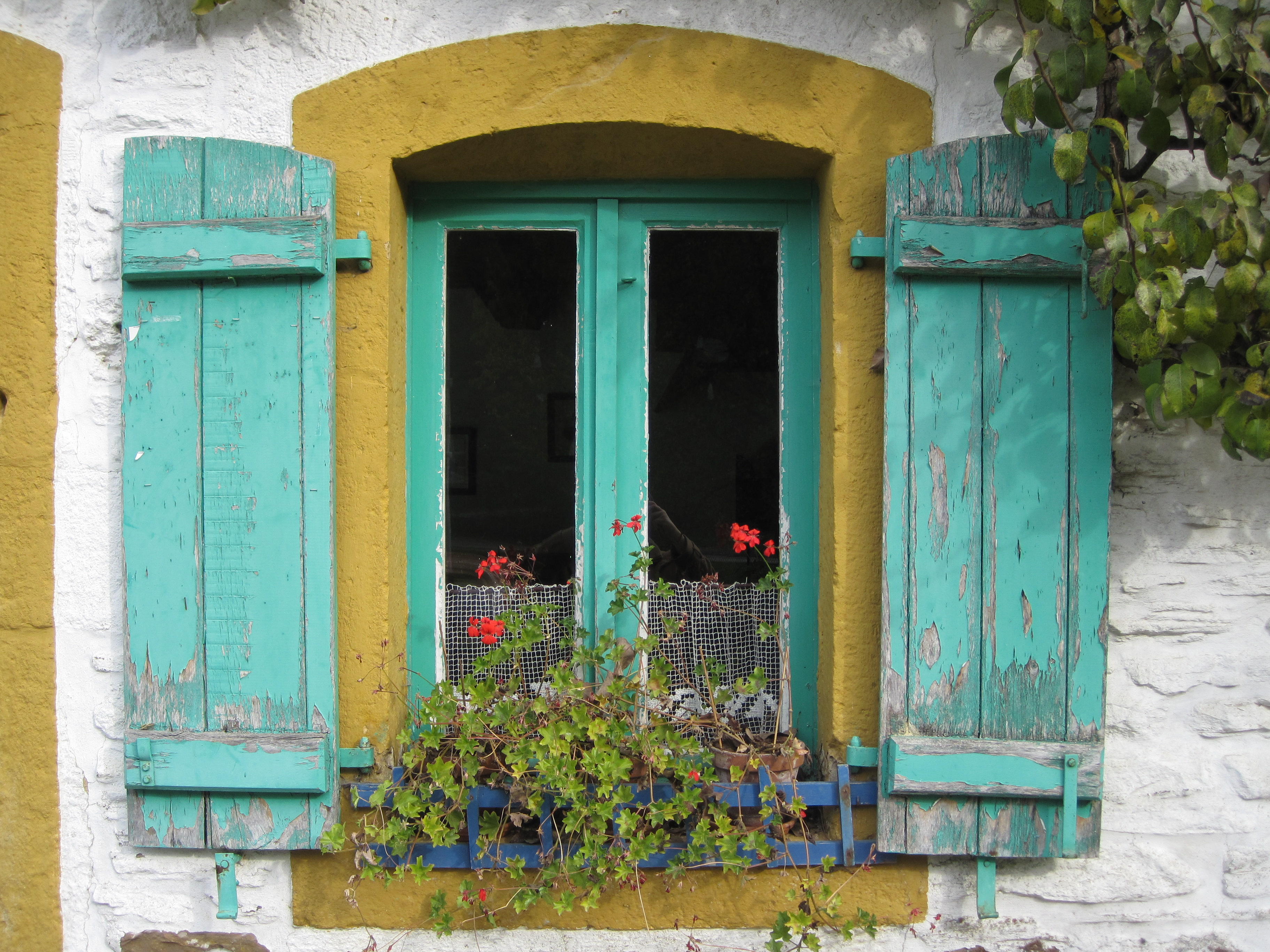 Gros-plan sur une fenêtre avec volets de la maison de Signeulx (Lorraine belge - milieu du XIXe siècle) transplantée entre 1976 et 1979 sur le domaine du Fourneau Saint-Michel à Saint-Hubert (Belgique).